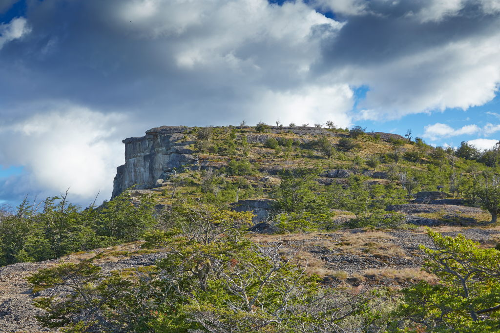 Cueva del Milodon i Chile.